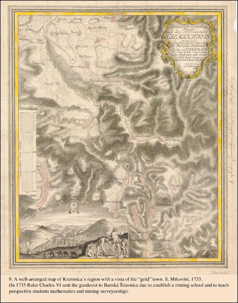 Mikoviny Sámuel térképe Körmöcbánya környékéről